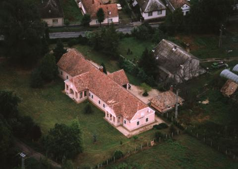 Kisgörbő, Hungary, aerialphotography